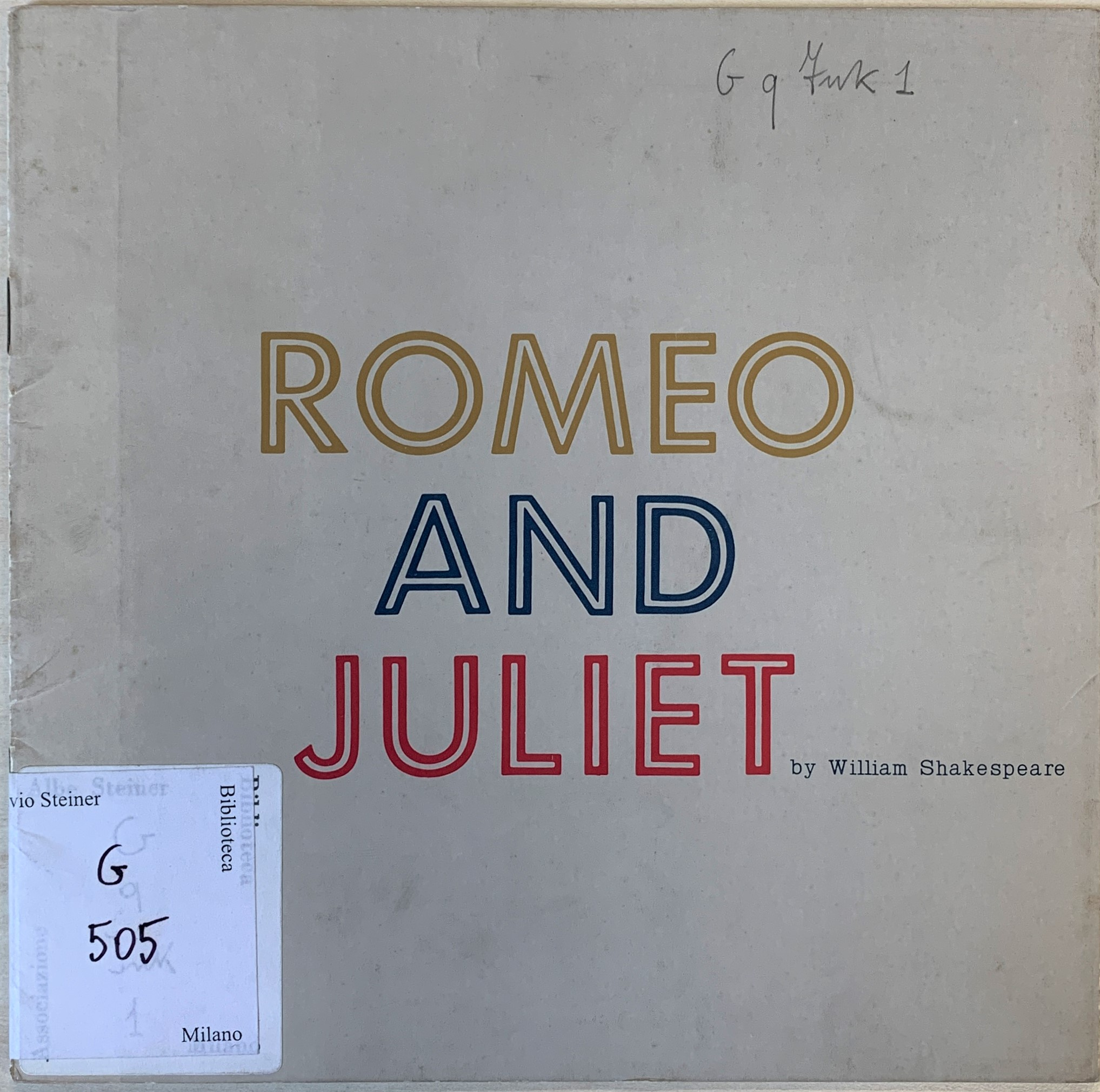 Copertina del libro Romeo and Juliet di Shigeo Fukuda